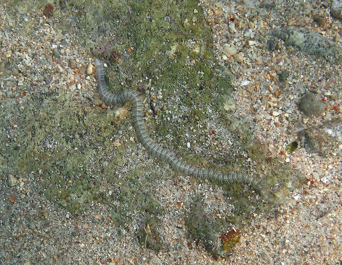 Un ver polynoïde (Polynoidae), possiblement Lepidasthenia sp.',' à la Réunion.